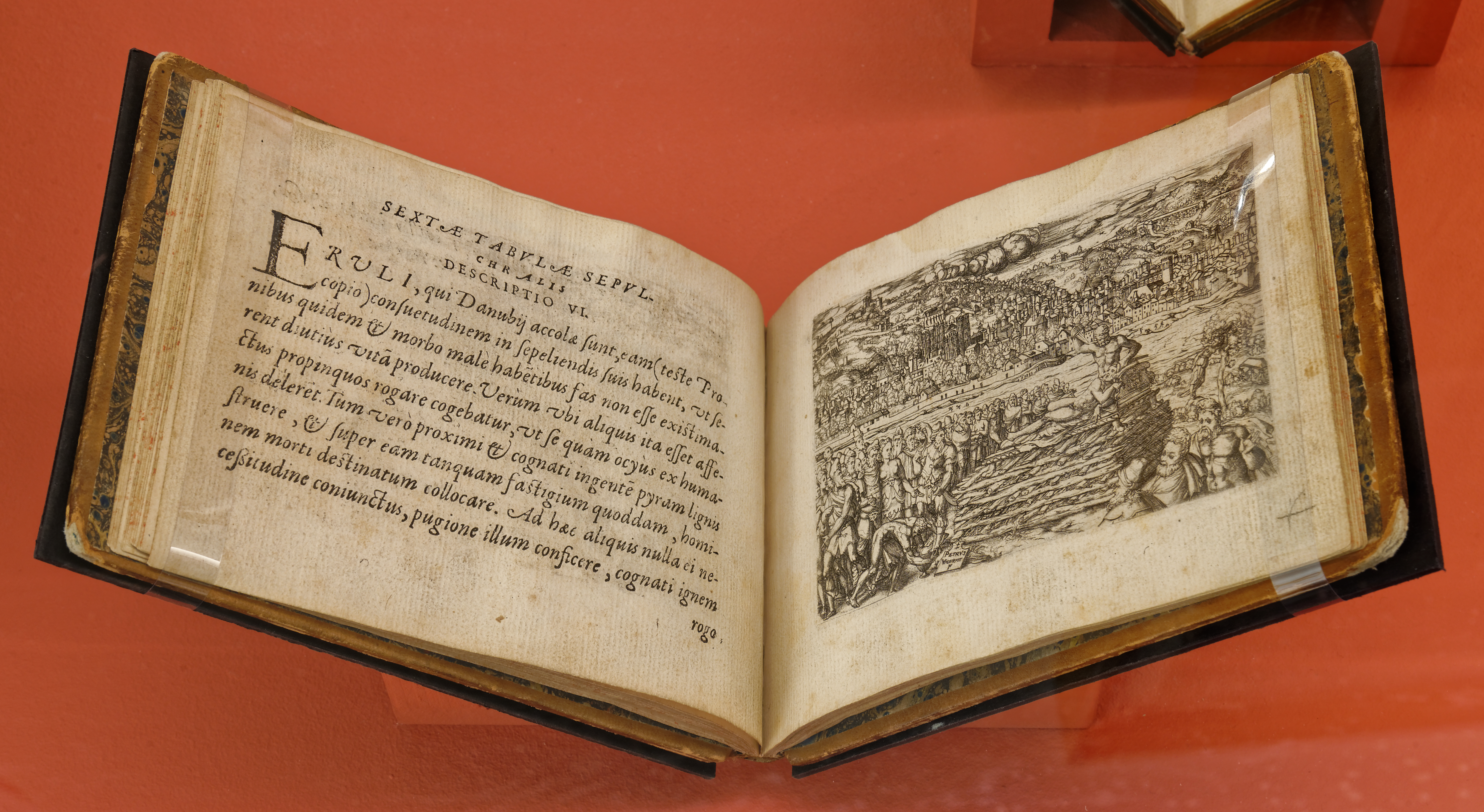 Exposition Lyon Renaissance. Arts et humanisme. Cat 4. Livre de Giglio Gregorio Giraldi Pinax Iconicus antiquorum ac variorum in sepulturis rituum, édité à Lyon en 1556. Illustration de Pierre II Woziriot de Bouzey représentant les funérailles chez les Hérules